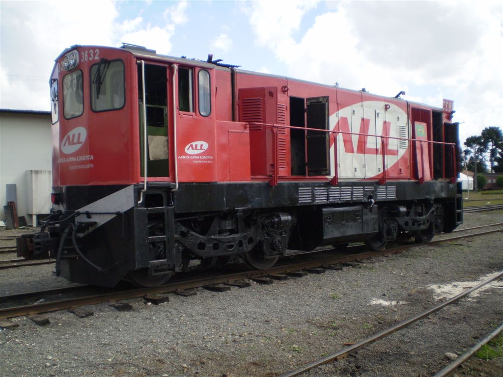 ALL GM GL8 #3632 B-B Oficinas da ALL em Curitiba-PR-Brasil